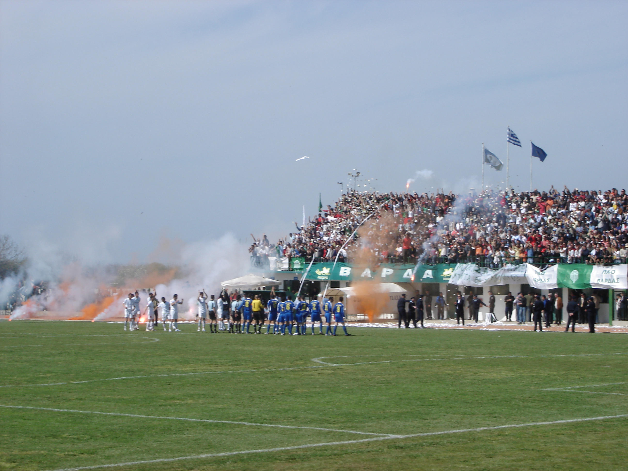 Pamvouprasiakos Vardas Greece